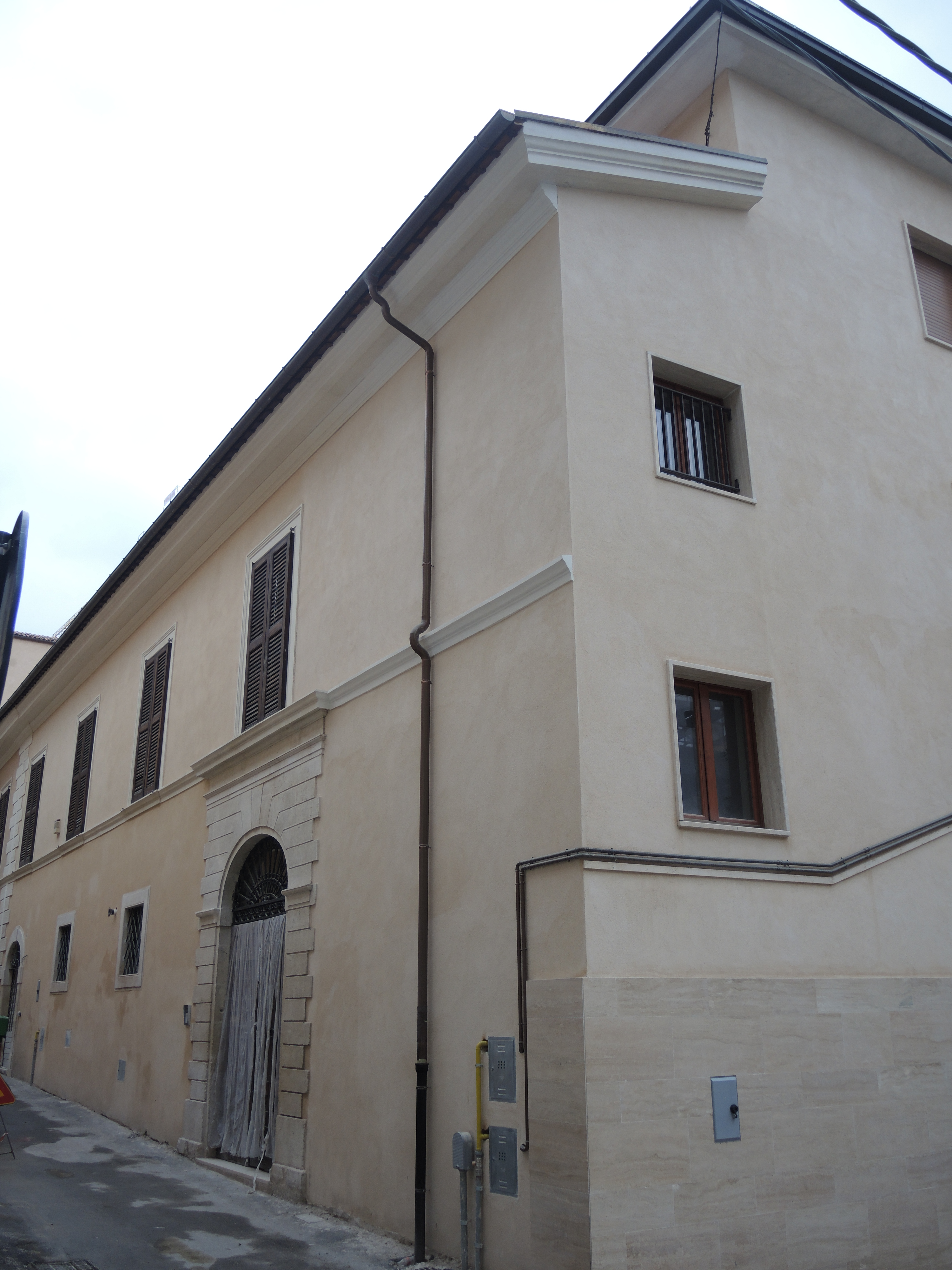 L'Aquila: Casa museo Signorini Corsi